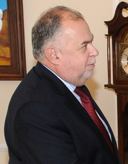 Diputado de Uruguay, Jaime Trobo.